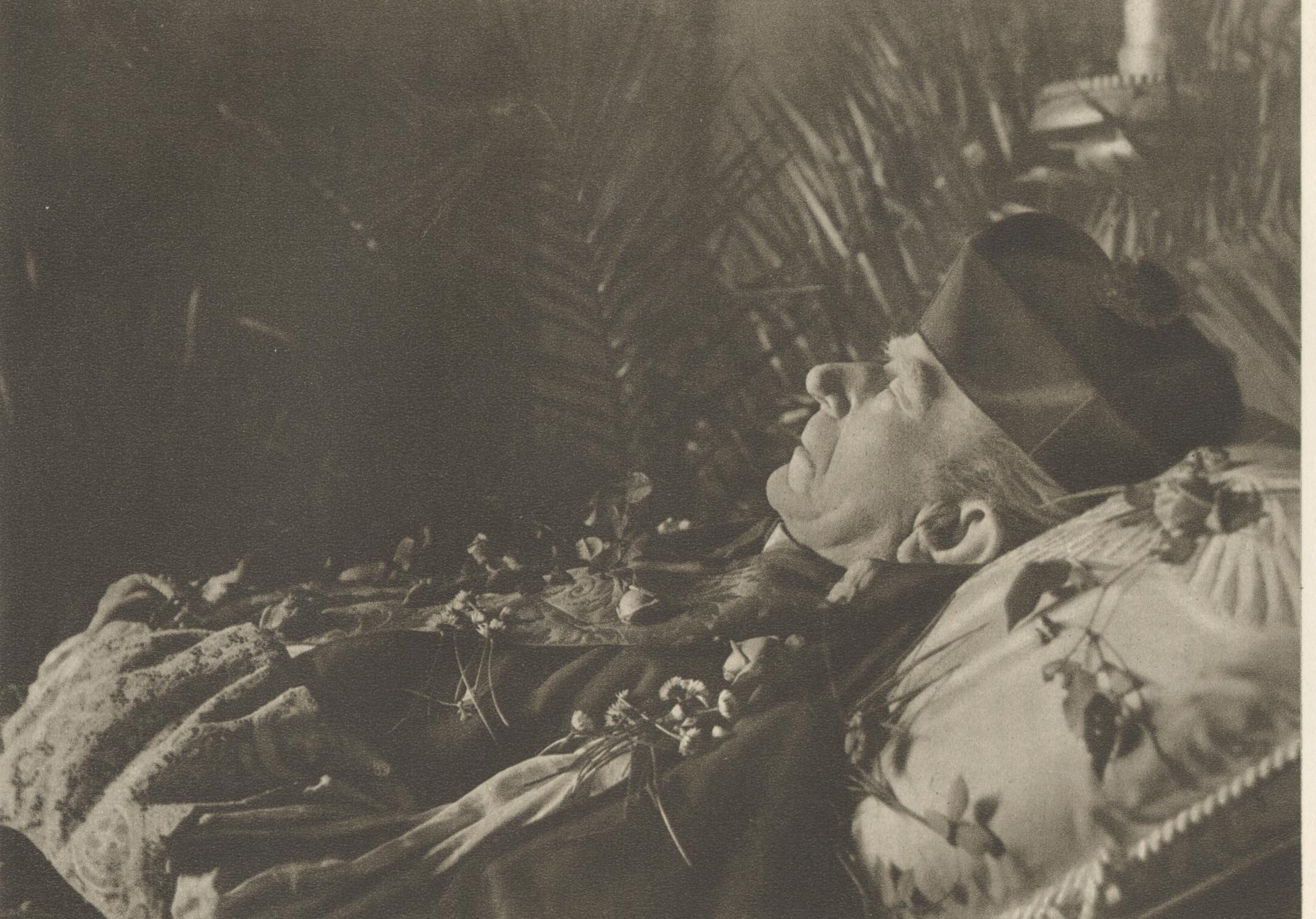 Prälat Anton de Waal, Rom, auf dem Sterbebett